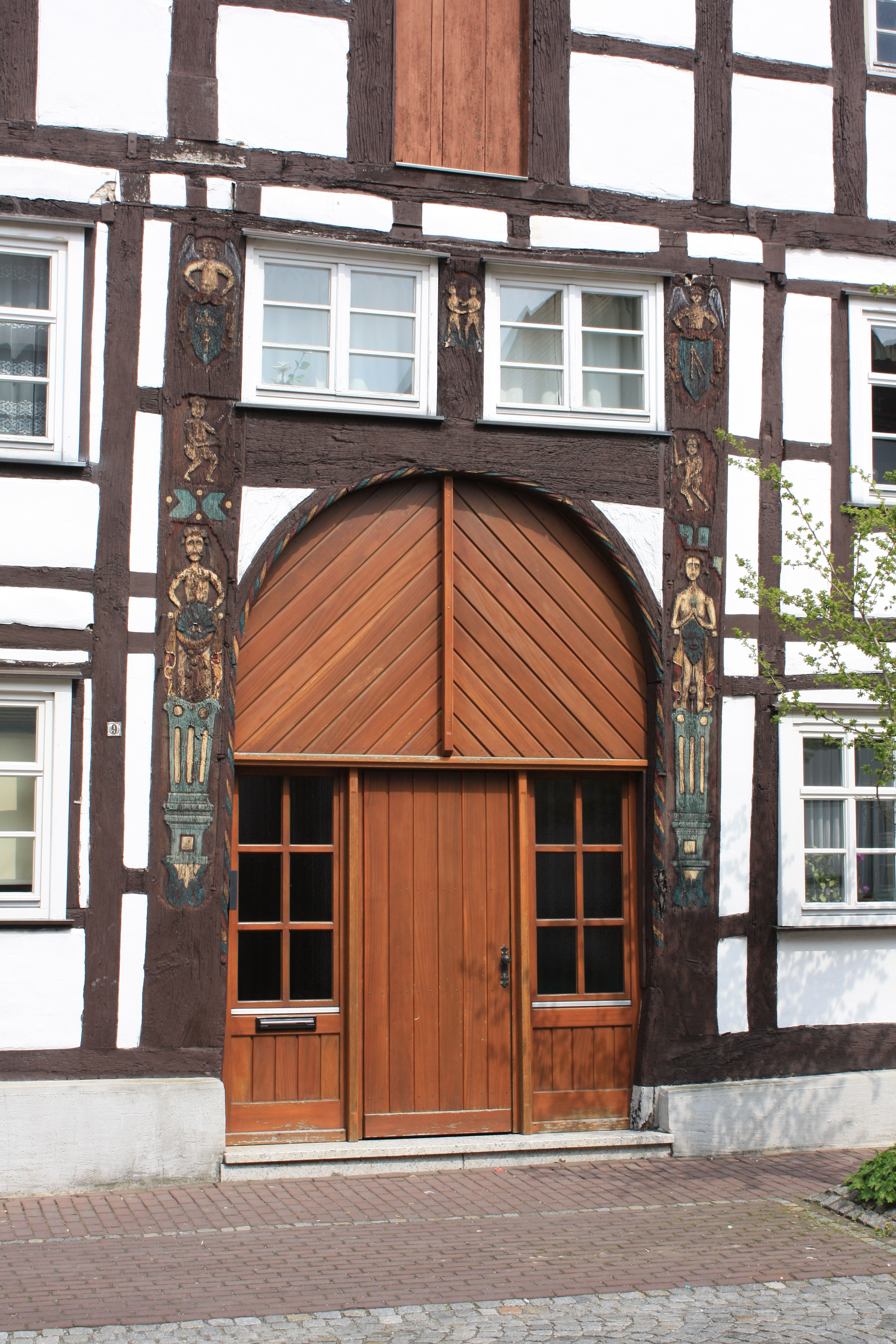 verziertes Eingangsportal eines Fachwerkhauses in Salzkotten (Adam- und Eva-Haus, Vielser Str. 9) This is the photograph of an architectural monument. It is part of the list of cultural monuments of Salzkotten, no. 63